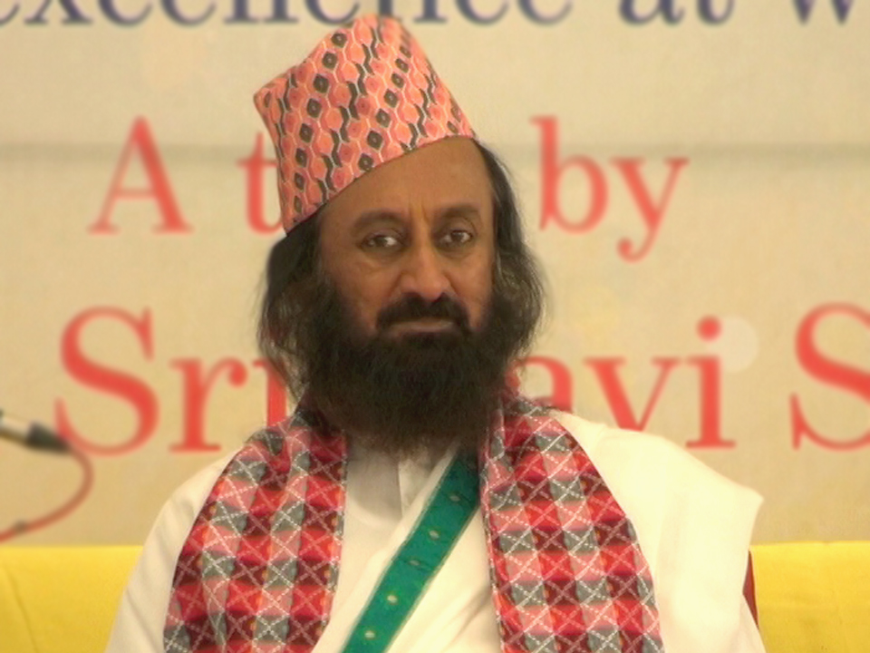 नेपाली: श्री श्री रविशंकर (धार्मिक गुरु)